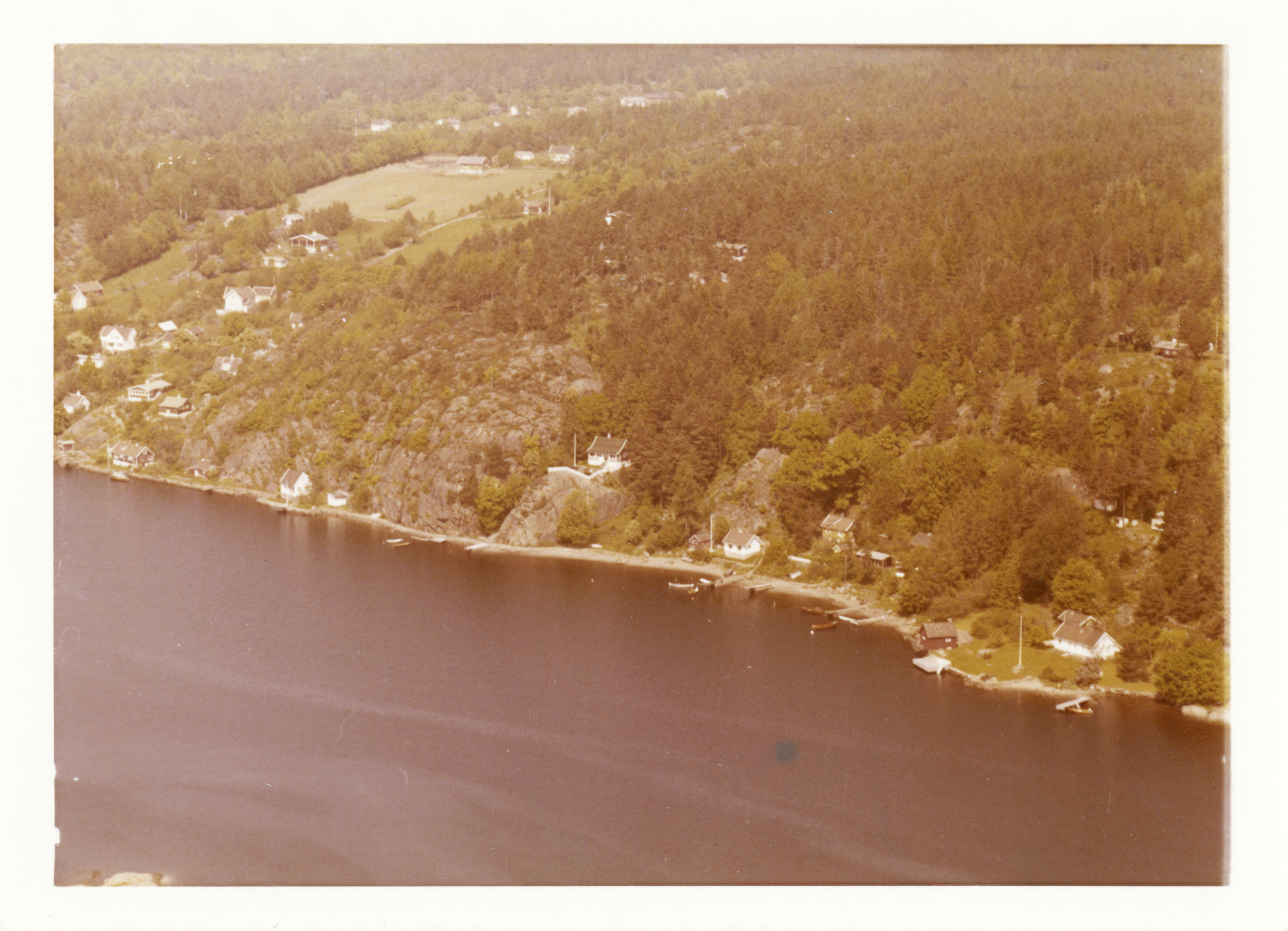 WF.S.164494